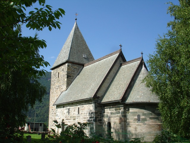 Bilete Hove steinkyrkje